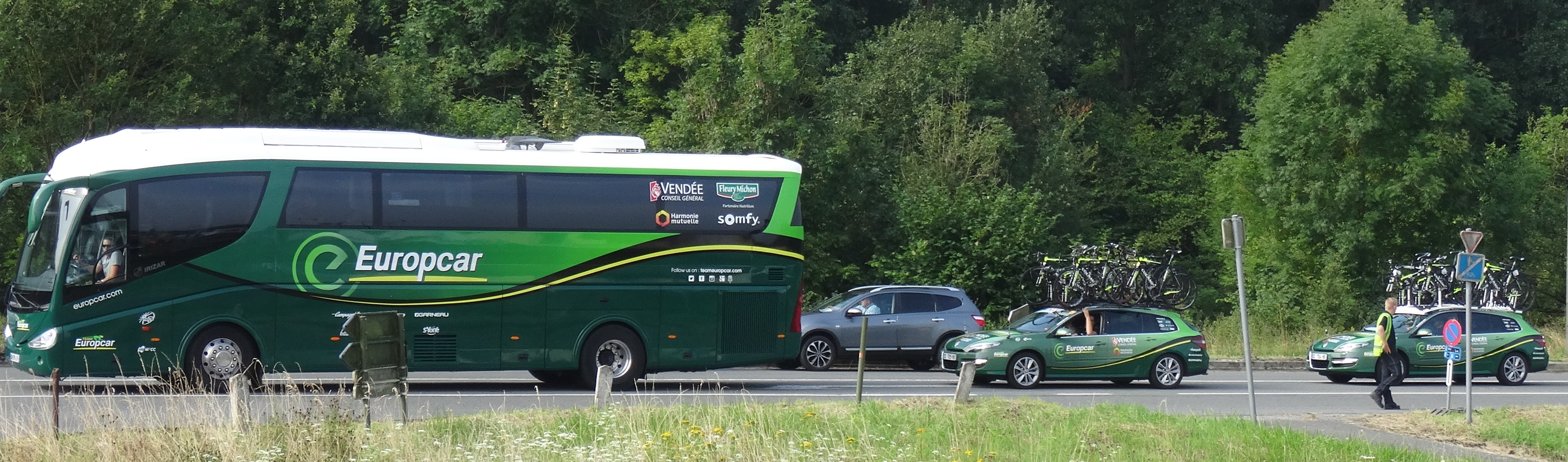 Reportage photographique réalisé le dimanche 27 juillet à l'occasion du départ de la deuxième étape du Tour de Wallonie 2014 à Péronnes-lez-Antoing (Antoing), Belgique.